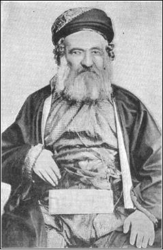 Jacob Saphir portrait.